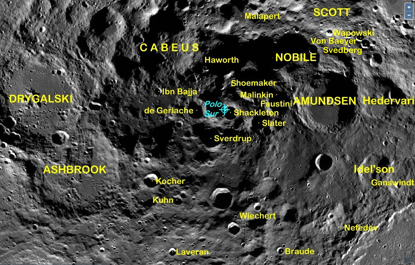 Cráteres lunares próximos al Polo Sur. (Imagen LRO)